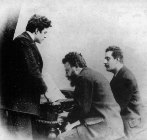 Da sinistra, i musicisti Pietro Mascagni, Alberto Franchetti (al pianoforte) e Giacomo Puccini